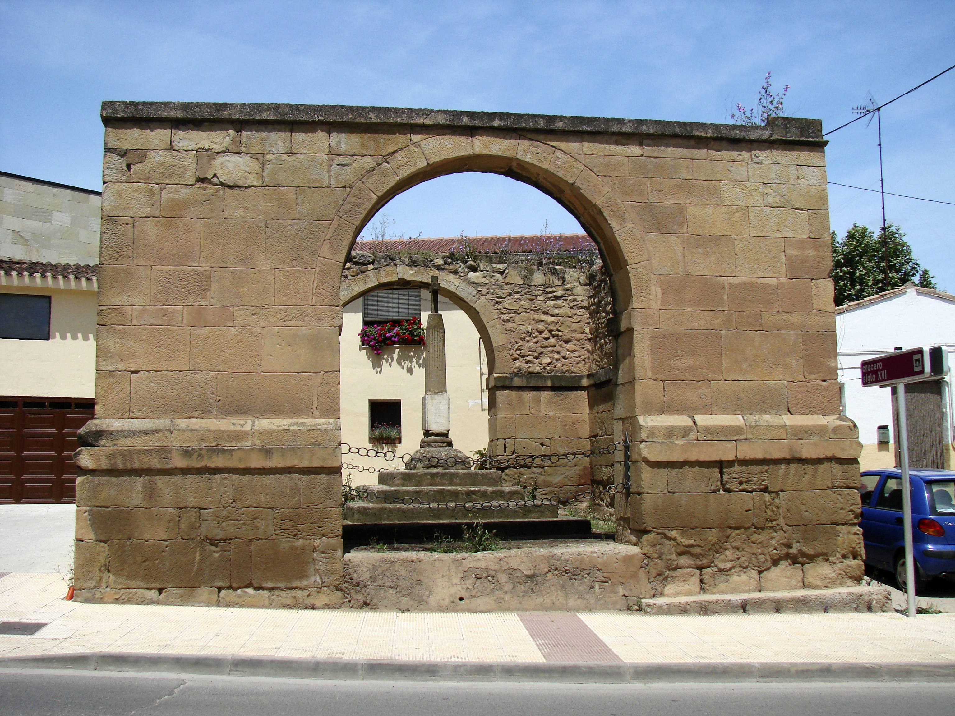 Crucero del siglo XVI en la localidad de Lardero, La Rioja - España